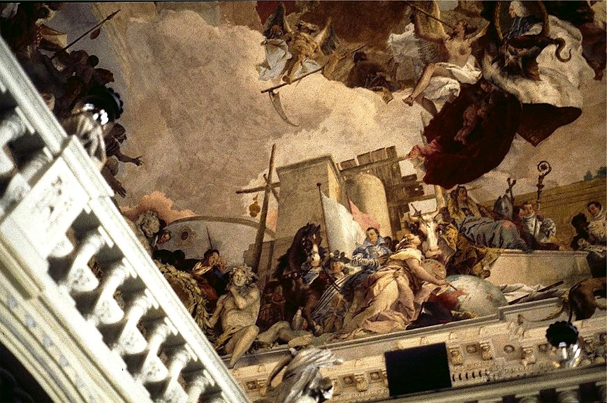 Ausschnitt aus dem Deckengemälde im Vestibül der Residenz von Würzburg. Treppenhaus Deckenfresco.